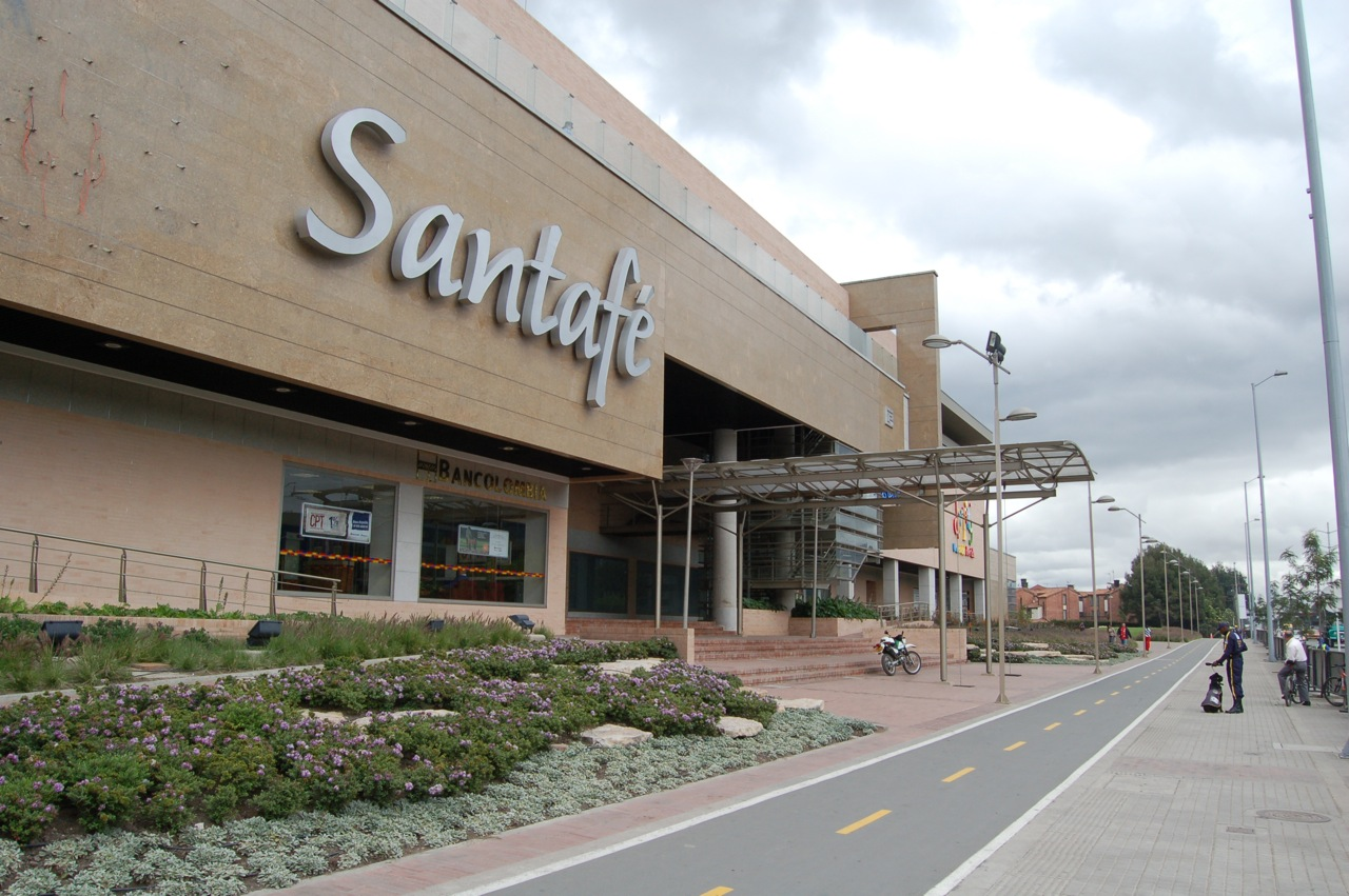 An upper scale mall in north Bogota